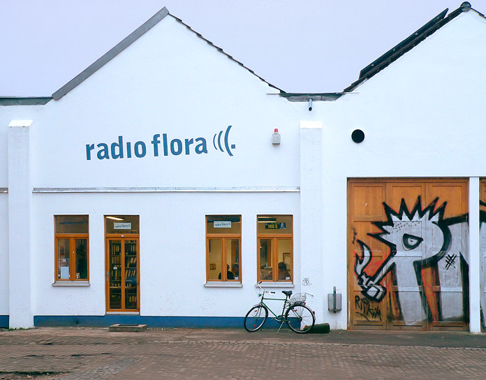 Radio Flora-Sendegebäude auf dem FAUST-Gelände in Hannover